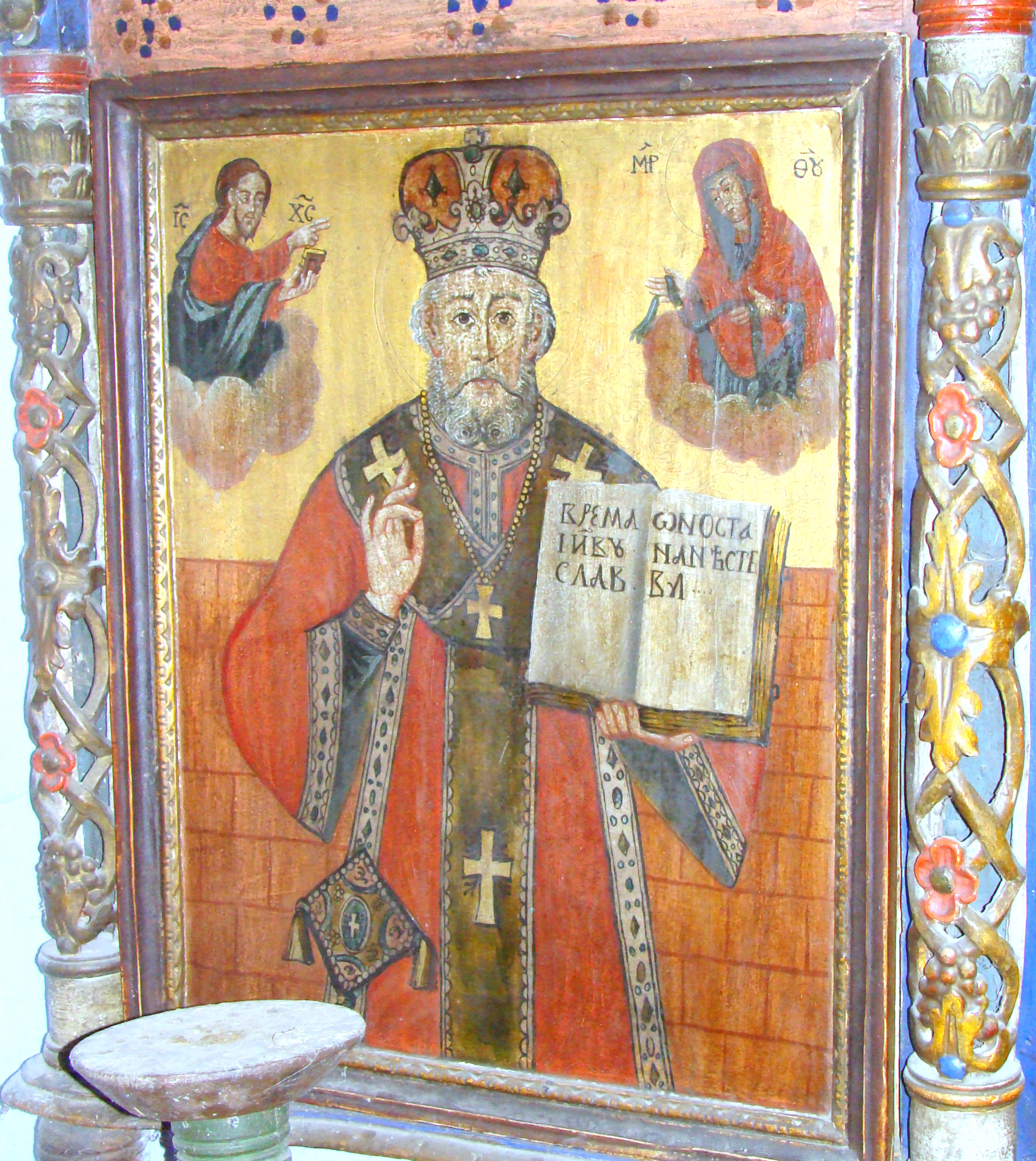 Biserica de lemn din Suplai-interioare